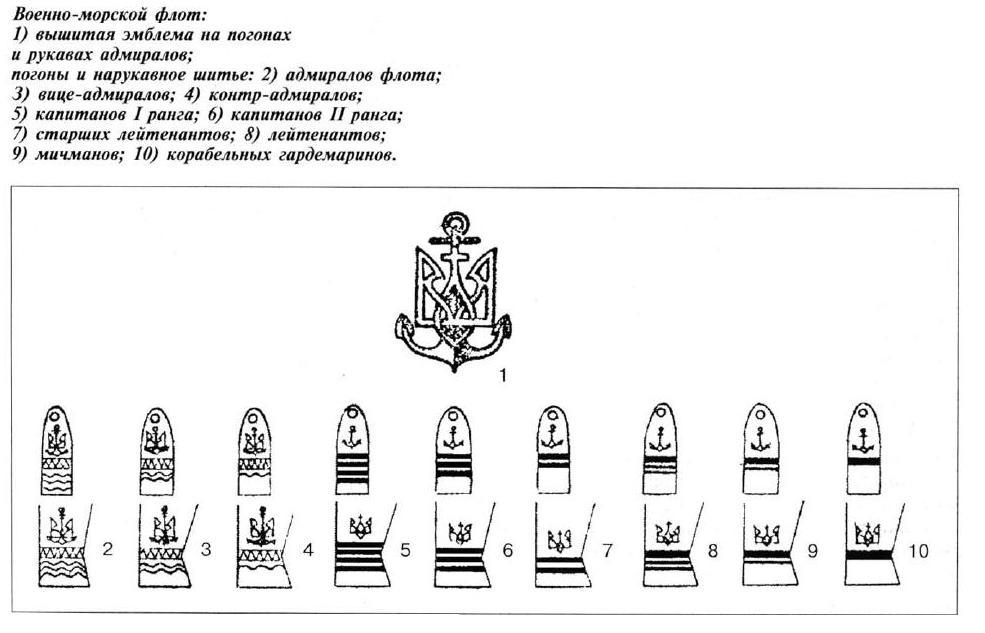 Элементы униформ Украинского Державного Флота, 1918-1924 гг.